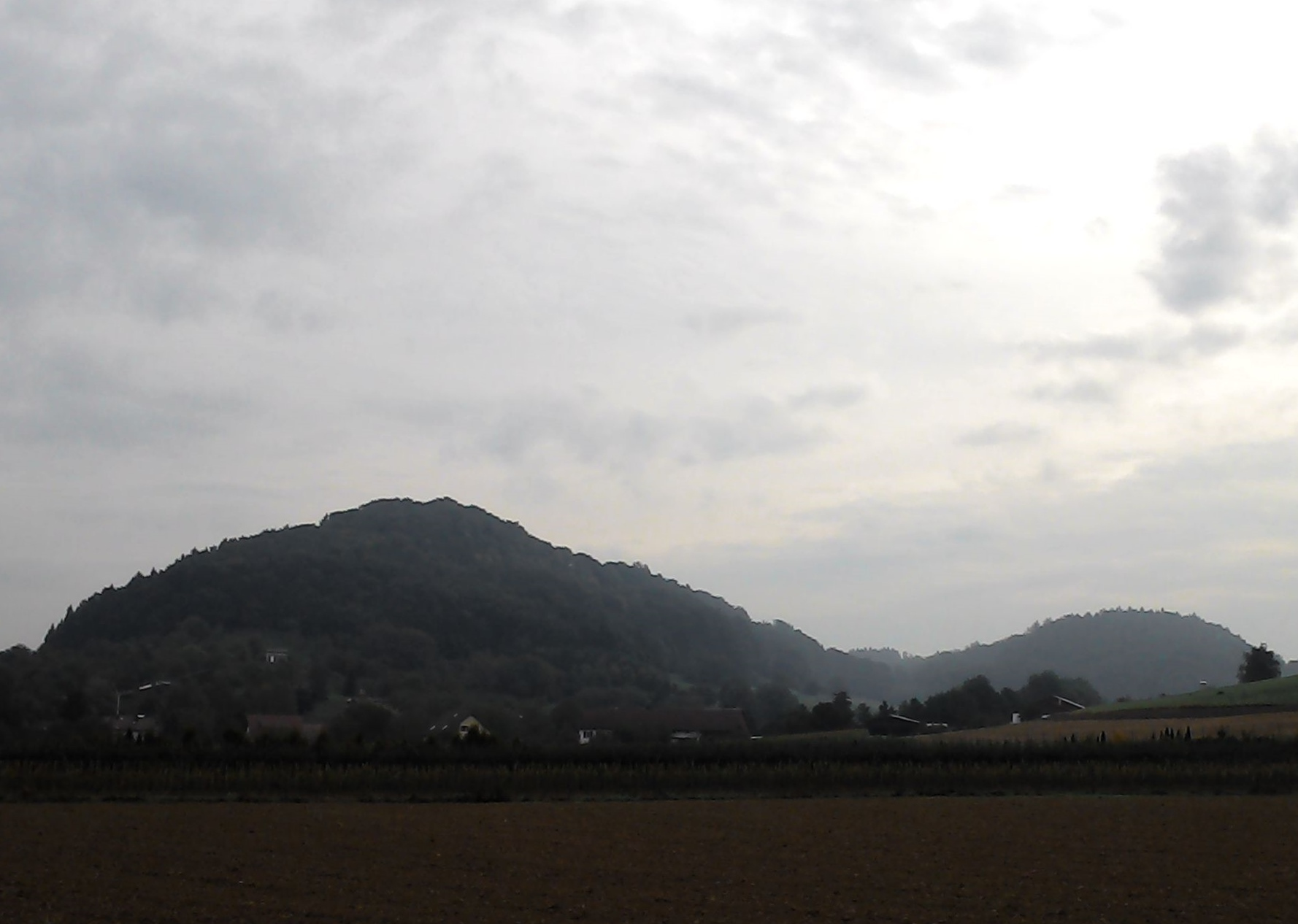 Semberg und Horn (rechts) bei Schwerzen (Gemeinde Wutöschingen), Landkreis Waldshut, Baden-Württemberg. Prähistorische Anlage auf dem Semberg.